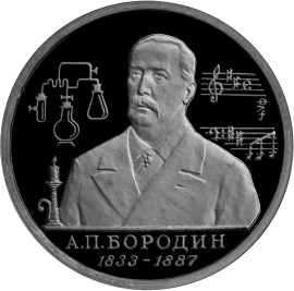 160-летие со дня рождения А.П.Бородина